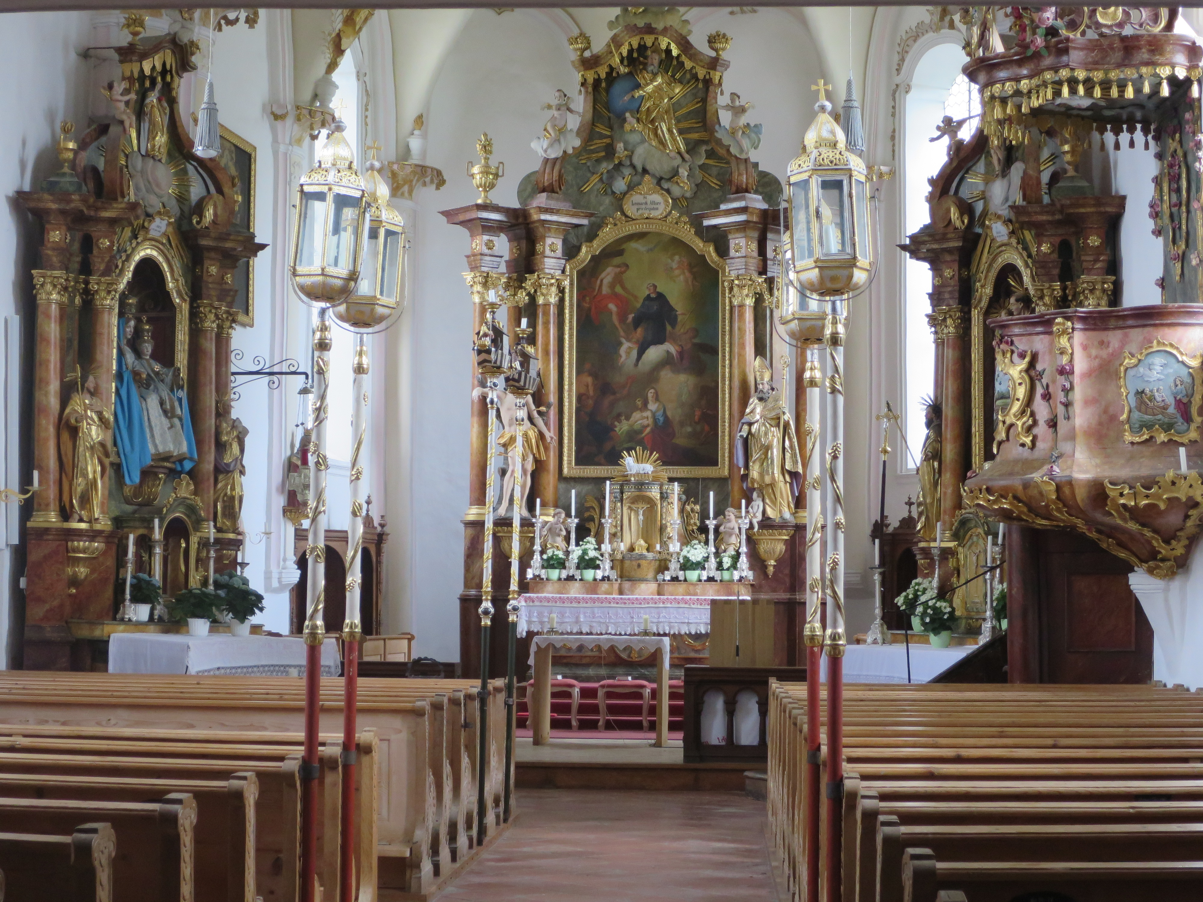 Kirchenraum